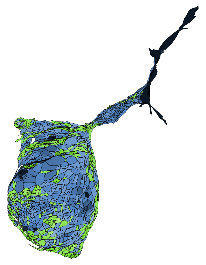 2018 高雄市市長選舉各里得票人口變形圖